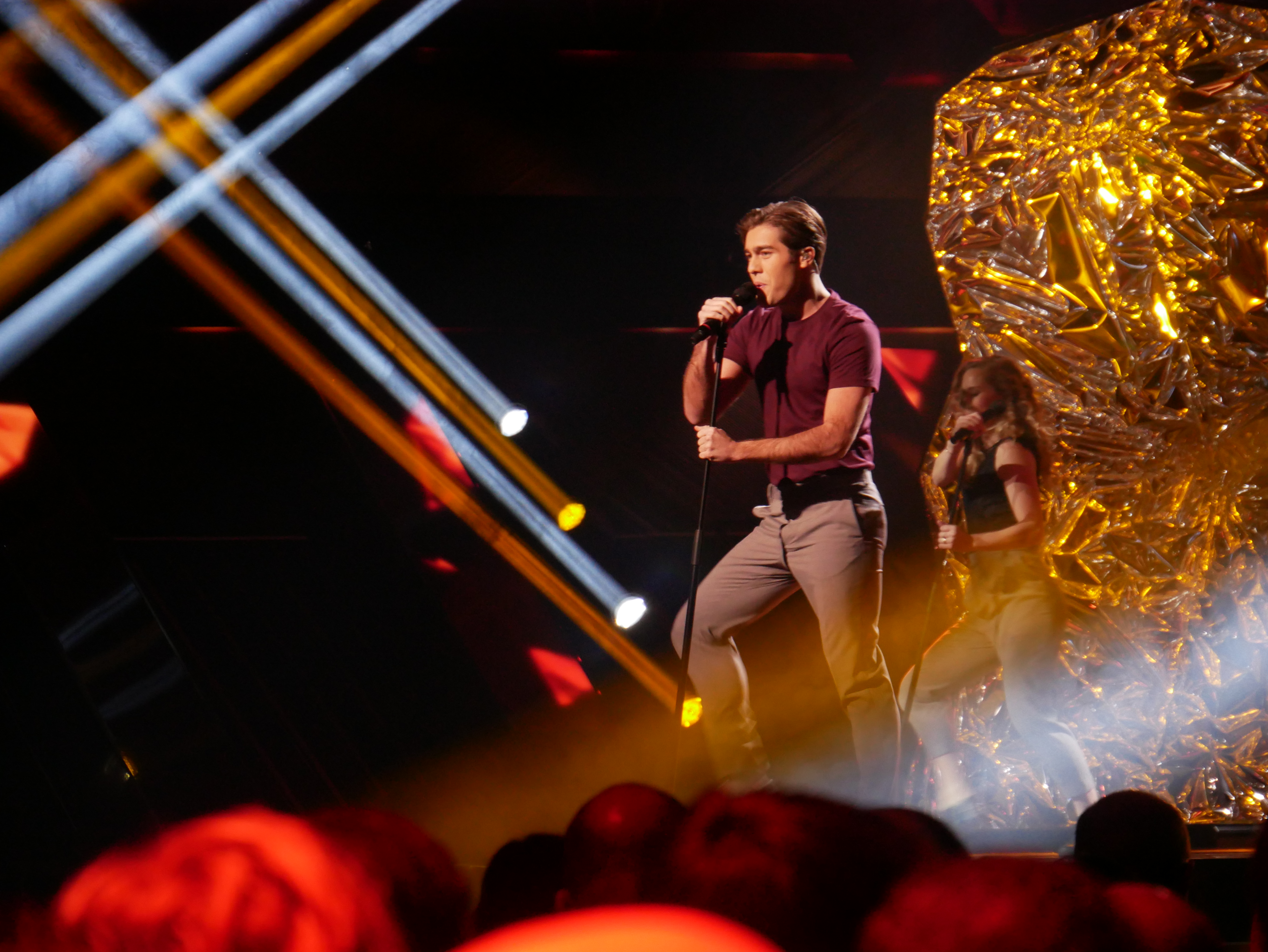 Melodifestivalen 2017, deltävling 2